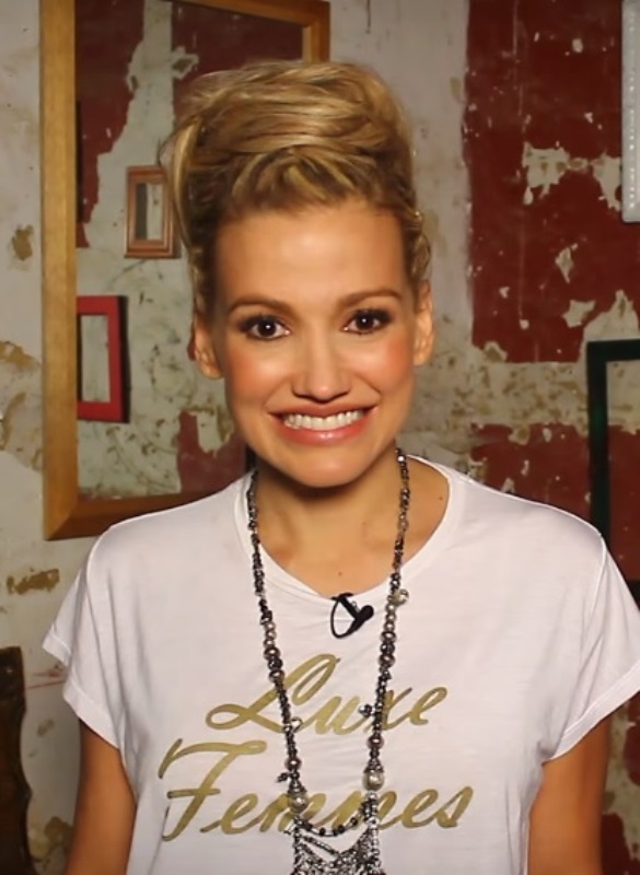 En una semana tendrás mi nueva canción #ElPerfume